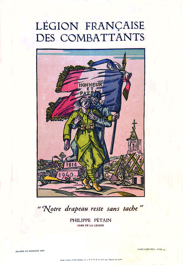 « Légion française des combattants - Philippe Pétain : Notre drapeau reste sans tache », affiche vichyste, imprimerie Audin Lyon, 1941 (106 x 74 cm).